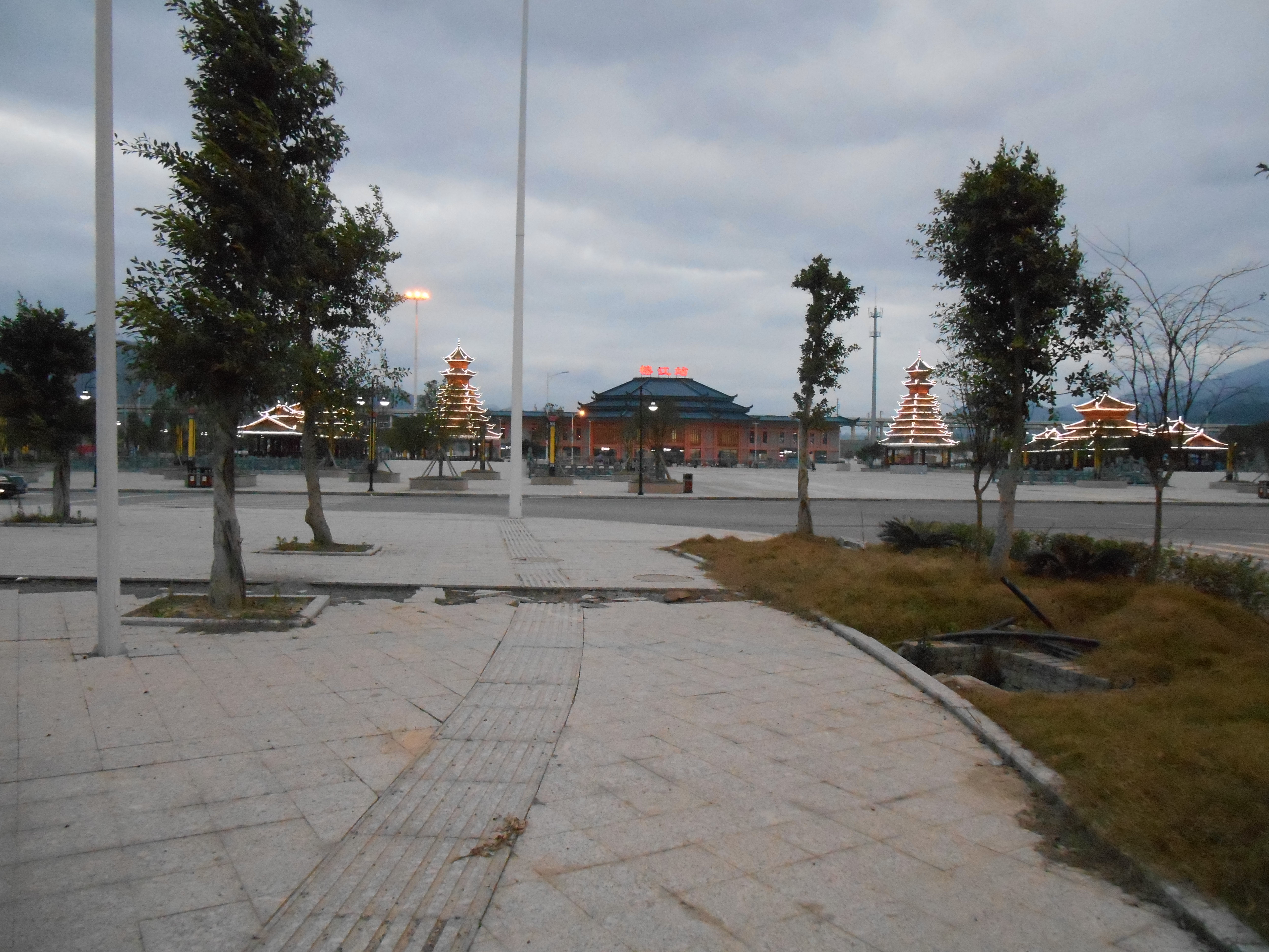 榕江高铁站--桂穿越